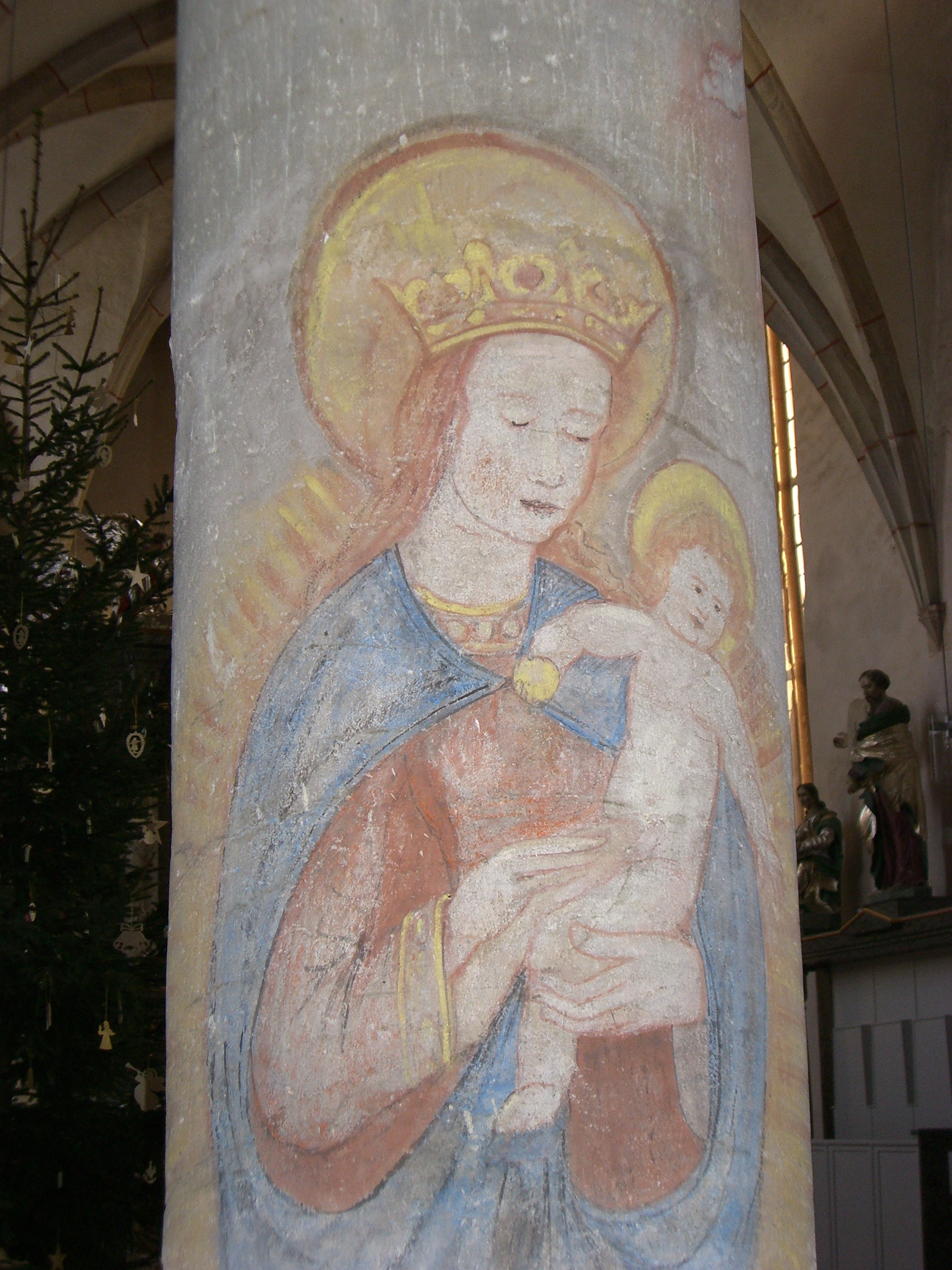 Säulenmalerei in der evang. Kirche St. Maria, Weißdorf